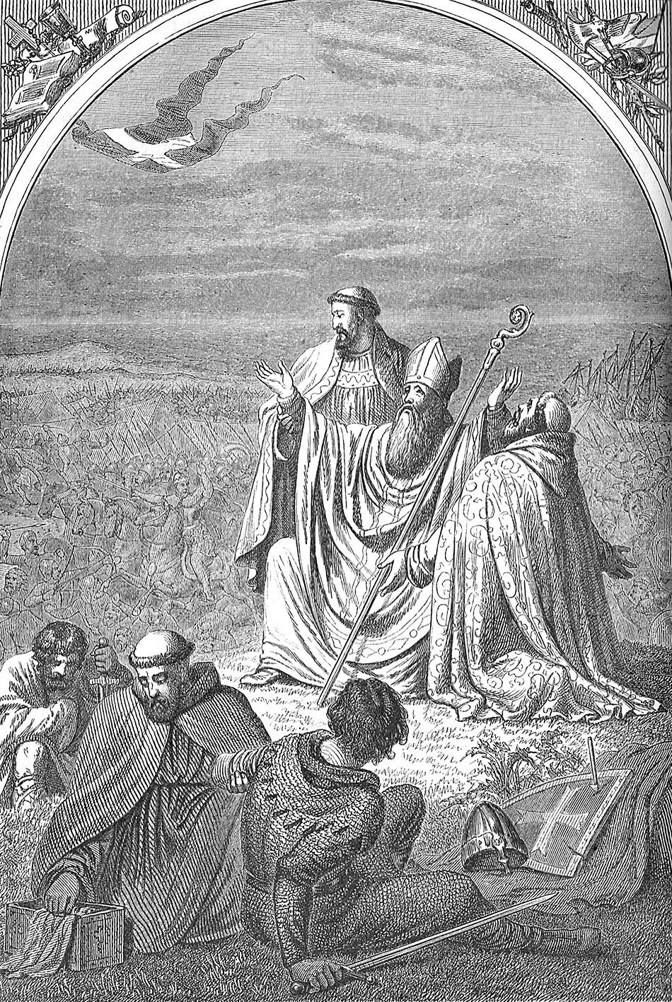 Anders Sunesen under Slaget ved Lyndanisse